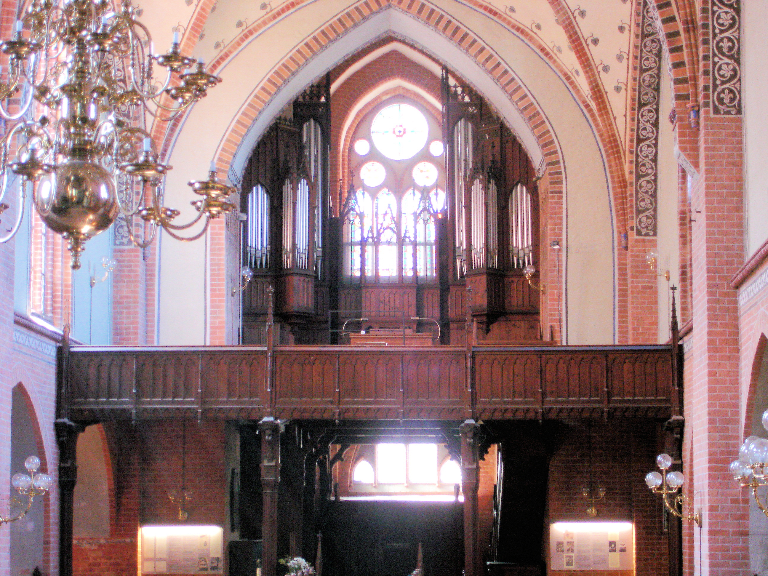 Orgelempore im Dom in Güstrow